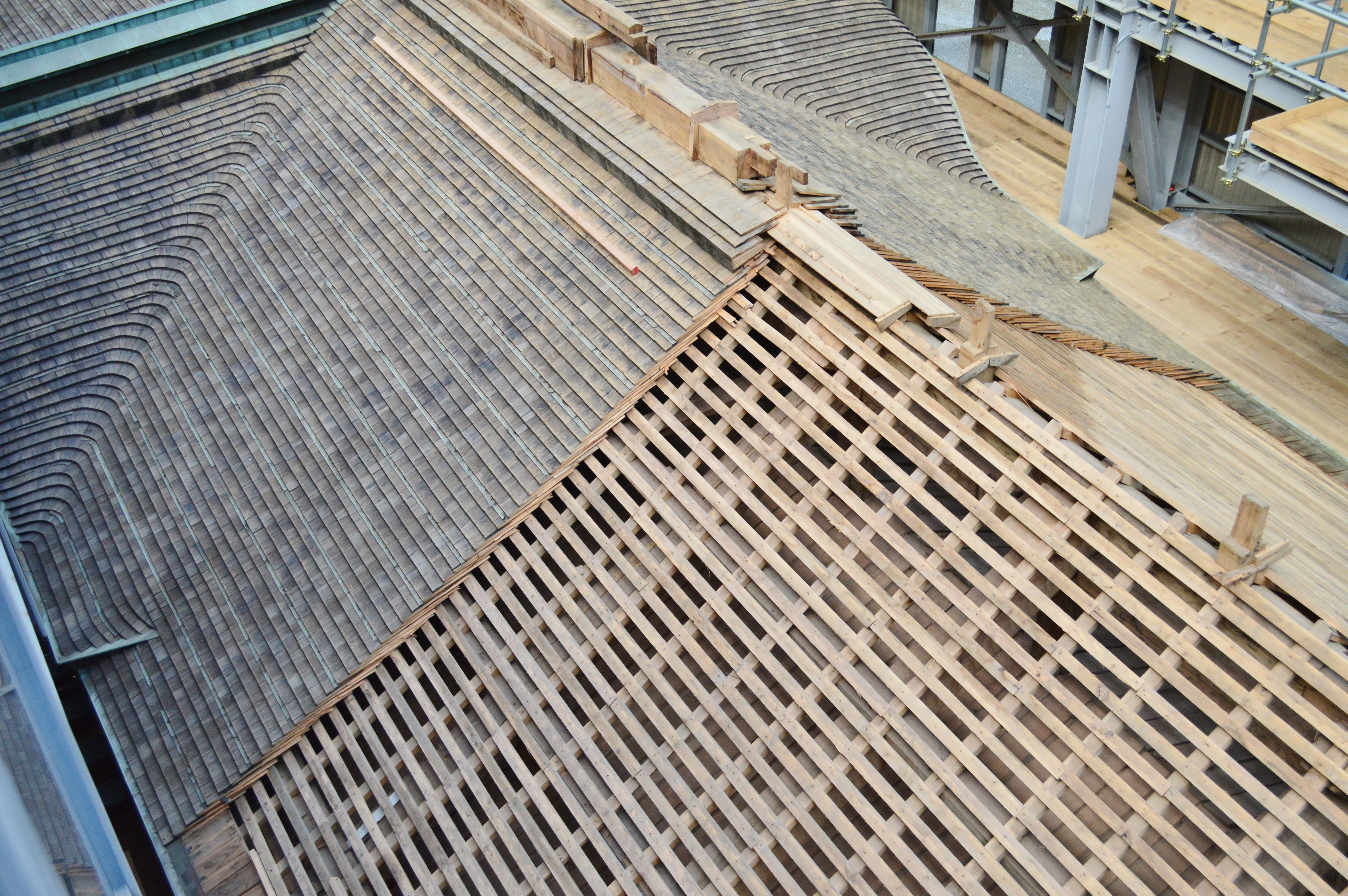 修復中の根本中堂 回廊屋根